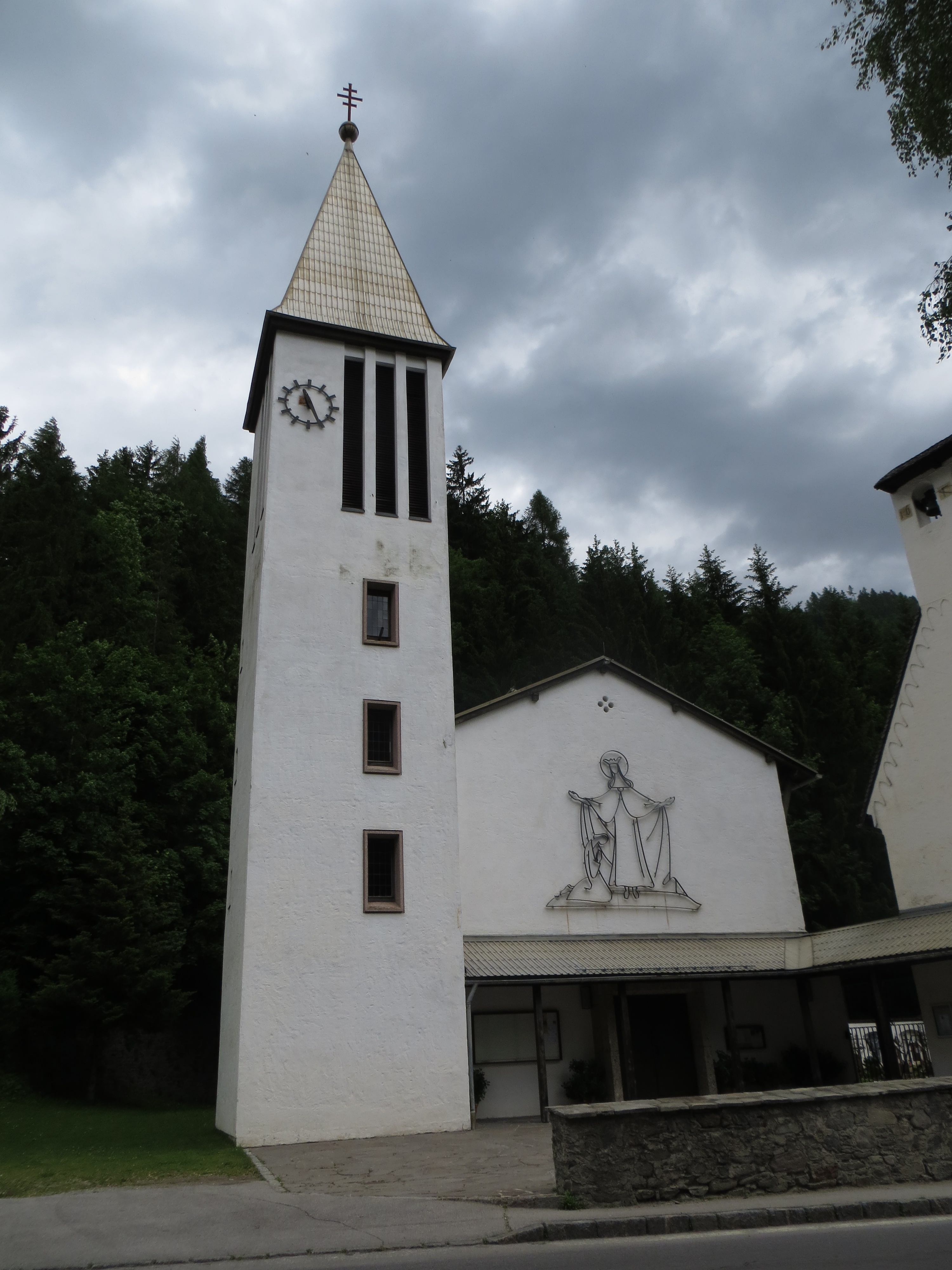 Pfarrvikariatskirche unserer lieben Frau Maria Unbefleckte Empfängnis